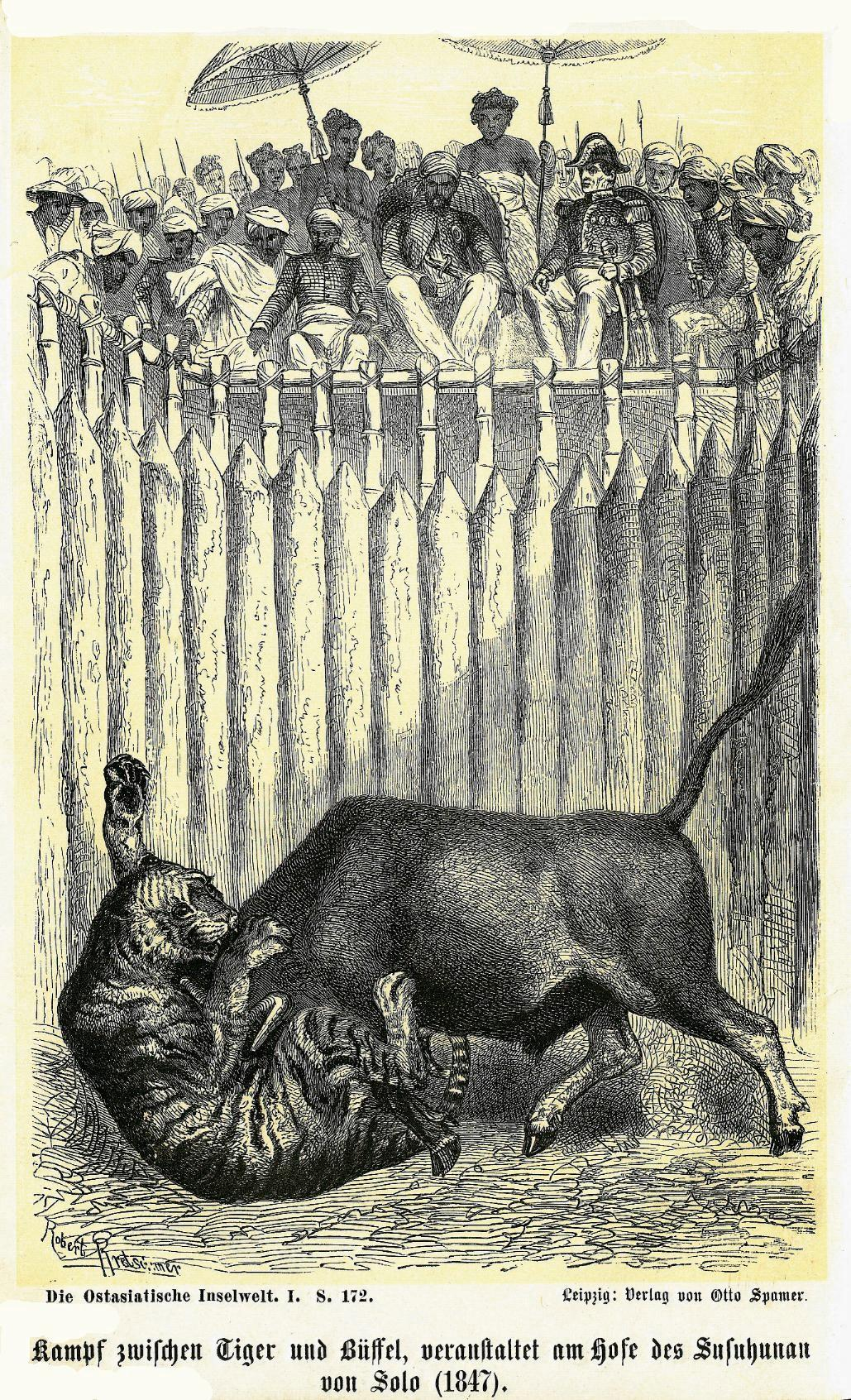 Ungleicher Kampf zwischen einem Tiger und einem Büffel.